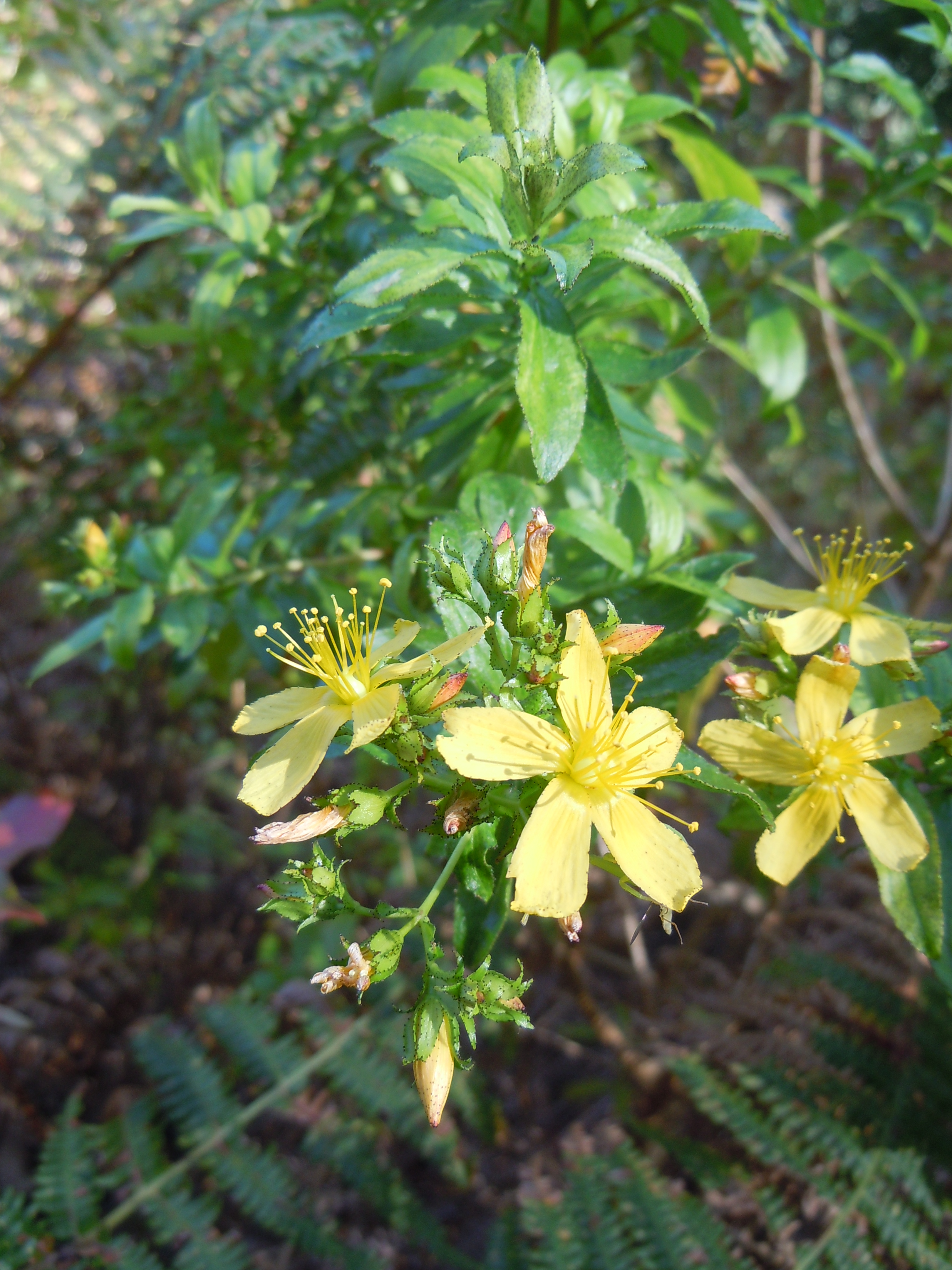 Hypericum glandulosum - Levada do Norte - Madere